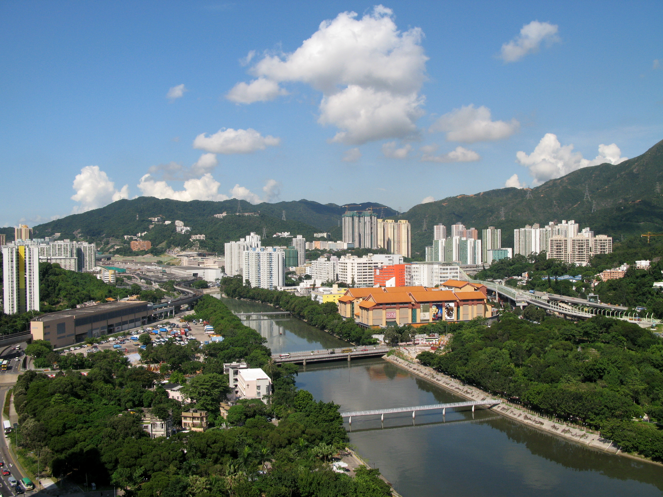 HK Tai Wai in 2007